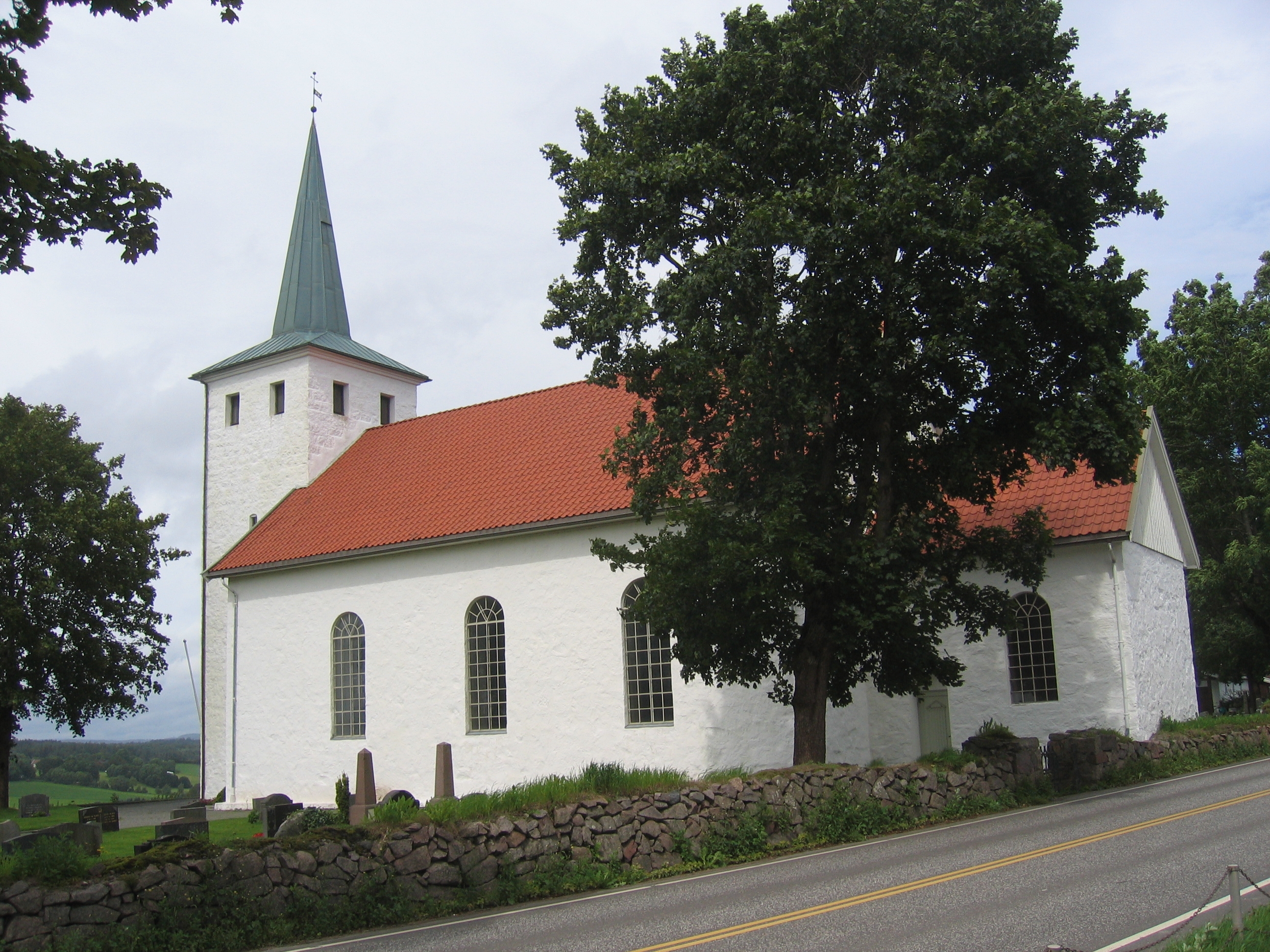 Skjee kirke in Stokke